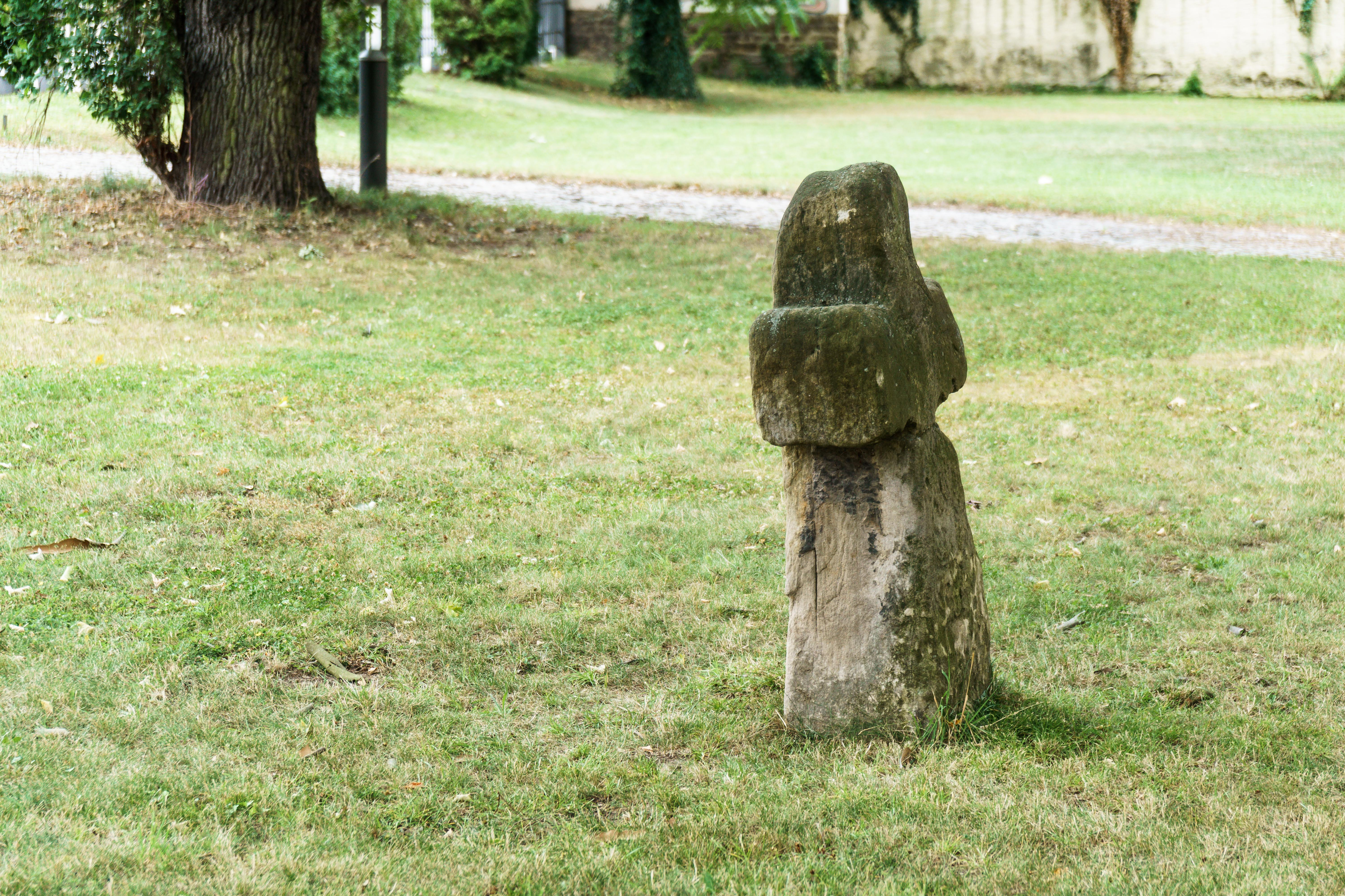 Steinkreuz, Badstubenvorstadt 12, im Garten des Albrecht`schen Palais von Zeitz